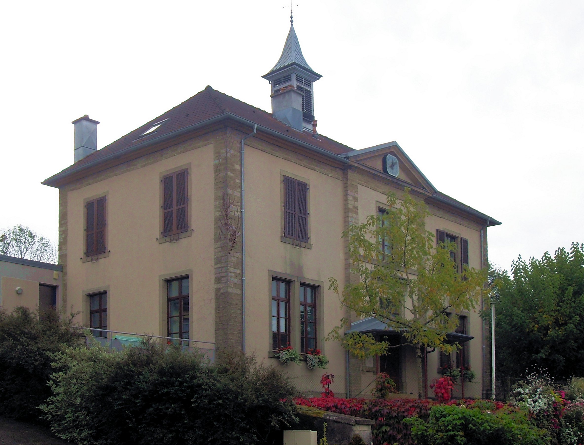 La mairie de Saint-Julien-lès-Montbéliard